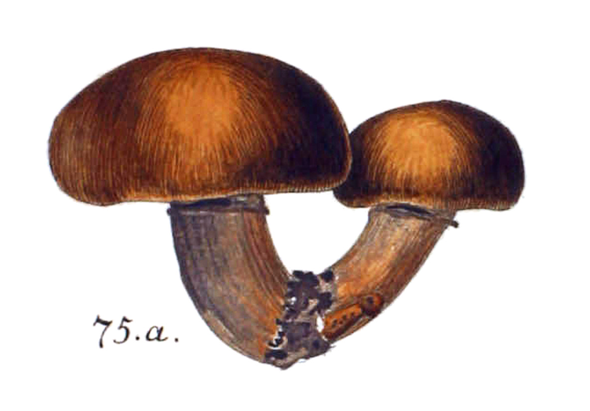 Plate VI: Fig. 75a; from August Batsch Book: Elenchus Fungorum. Continuatio Prima Description of Agaricus subannulatus by the author (in German und Latin): Description in Latin Pileo pallide spadiceo, glabro; stipite brevi bulboso, flavente, supra annulum spurium albo, laminis albentibus. Pileus pallide spadicens, subnitens, quasi tenerrime fibroso-venulosus, margine valde in curvo, in ora extima intror-sum involato, ibi subtomentoso, et late-ritio. Totus pileus solum impositus stipiti et usque ad marginem crasse pulvinatus, convexus. Stipes crassus, brevis, sensim deorsum crassescens, basi rotundato -bulbosa. Superficies sub pileo alba, candido - furfu-racca, usque ad annulum spurium, qui est reflexa summa pars angusta cutis, re-liquum stipitem obducentis, pallide auran-tiac , vel ochraceo - sulphureae , molliter lanato-fibrosae. Ad basin stipitis lanugo alba conspicitur, et ibidem juniores fer-rugineo-fulvelli, pruinati, pullulant. Substantia stipitis fibrosa, pilei solidior, utraque pallidissime carneo-alba, et vermibus f. larvis infestata. Laminae angustatae, oblongae, utro-que termino convexiusculae, tenerae, densae, ochraceo-carneae, coloris luridi et obscurioris quam substantia. Majores circiter 70 interjectis minoribus. Non-nunquam coalescunt. Crescebat in terra sylvae abiegnae mon-tis Ettersberg, fine Octobris 1785 non frequens. Icones. a. Duo integri, connati, pullo adjecto ad basin. 75 a. Agaricus subannulatus, now Tricholoma batschii